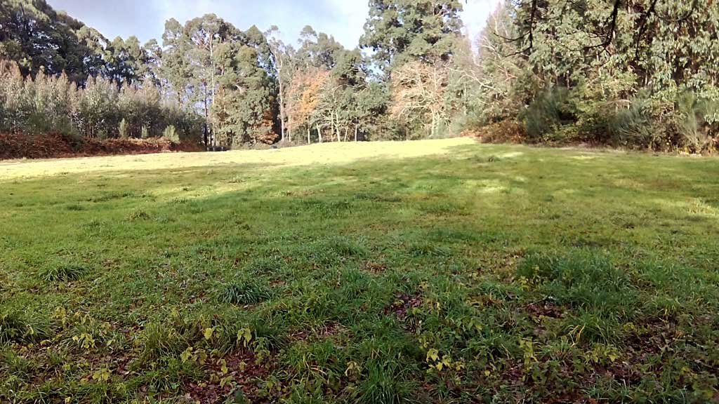 Croa do Castro da Roda de Dentro, Os Godulfes.